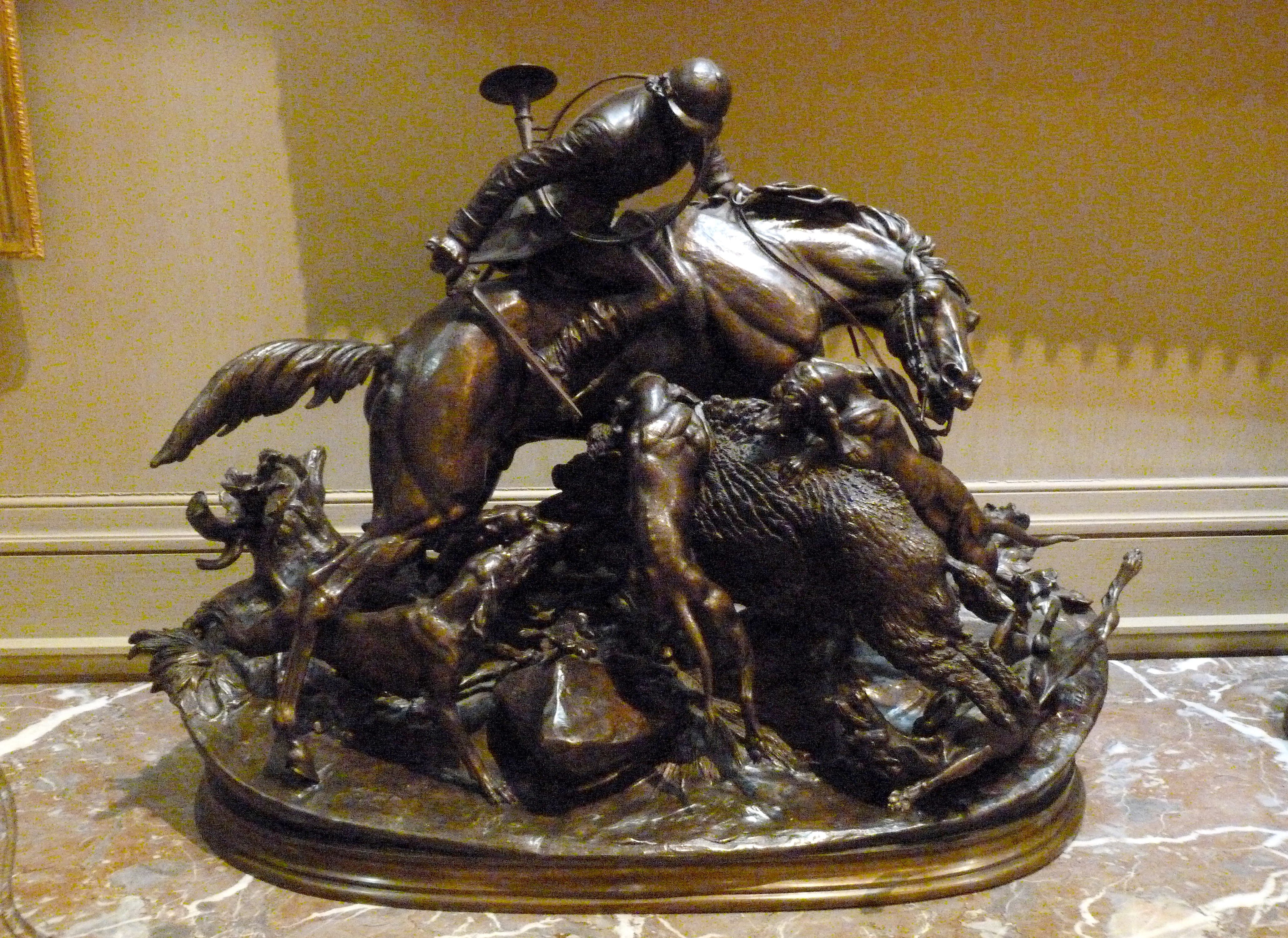 La Chasse au sanglier groupe en bronze par Jules Moigniez (1835-1894), hauteur environ 40 cm - Musée de la chasse et de la nature (Paris)